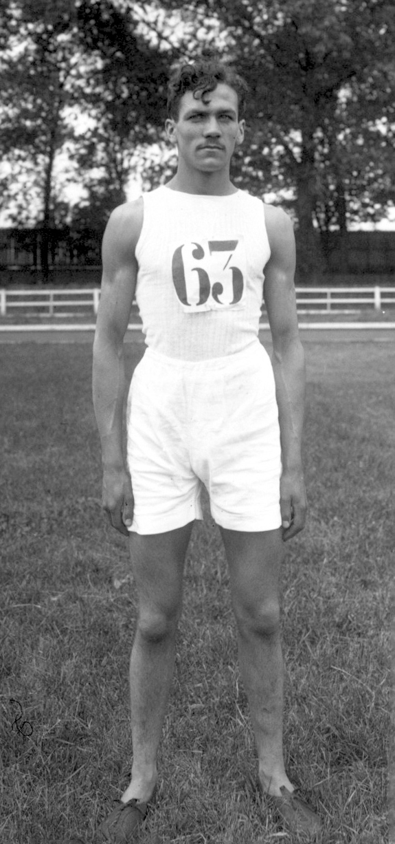 René Labat, Colombes, le 18 juin 1911 [Championnats de France d'athlétisme de l'U.S.F.S. A.]